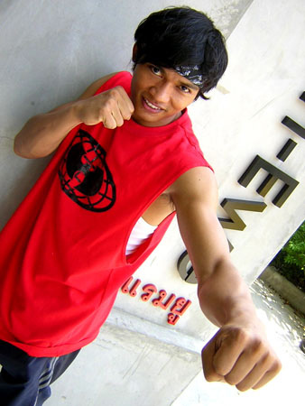 Tony Jaa in Bangkok in 2005